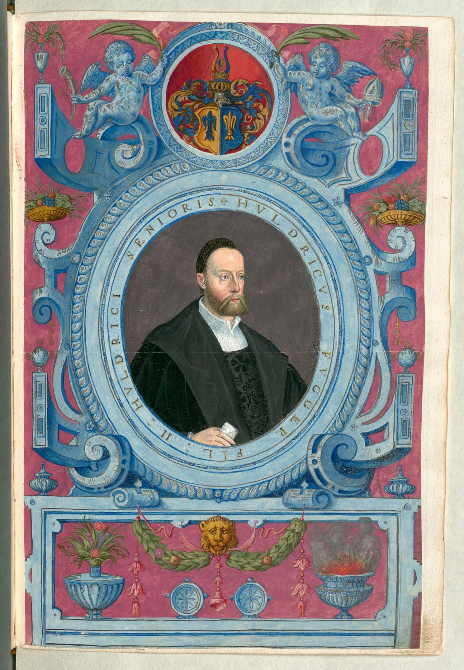 Fuggerorum et Fuggerarum imagines wurde 1588 von Philipp Eduard Fugger beim Kupferstecher Dominicus Custos in Auftrag gegeben. Das Werk enthält mit Aquarell- und Gouache-Farbe kolorierte Stiche der Mitglieder der Fugger von der Lilie. Der Druck von 1618 stellt das einzige kolorierte Exemplar dar. Ulrich Fugger der Jüngere (1490-1525) auch Ulrich II.